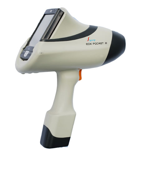 Портативный спектрометр Skyray EDX-Pocket-IIIдля анализа